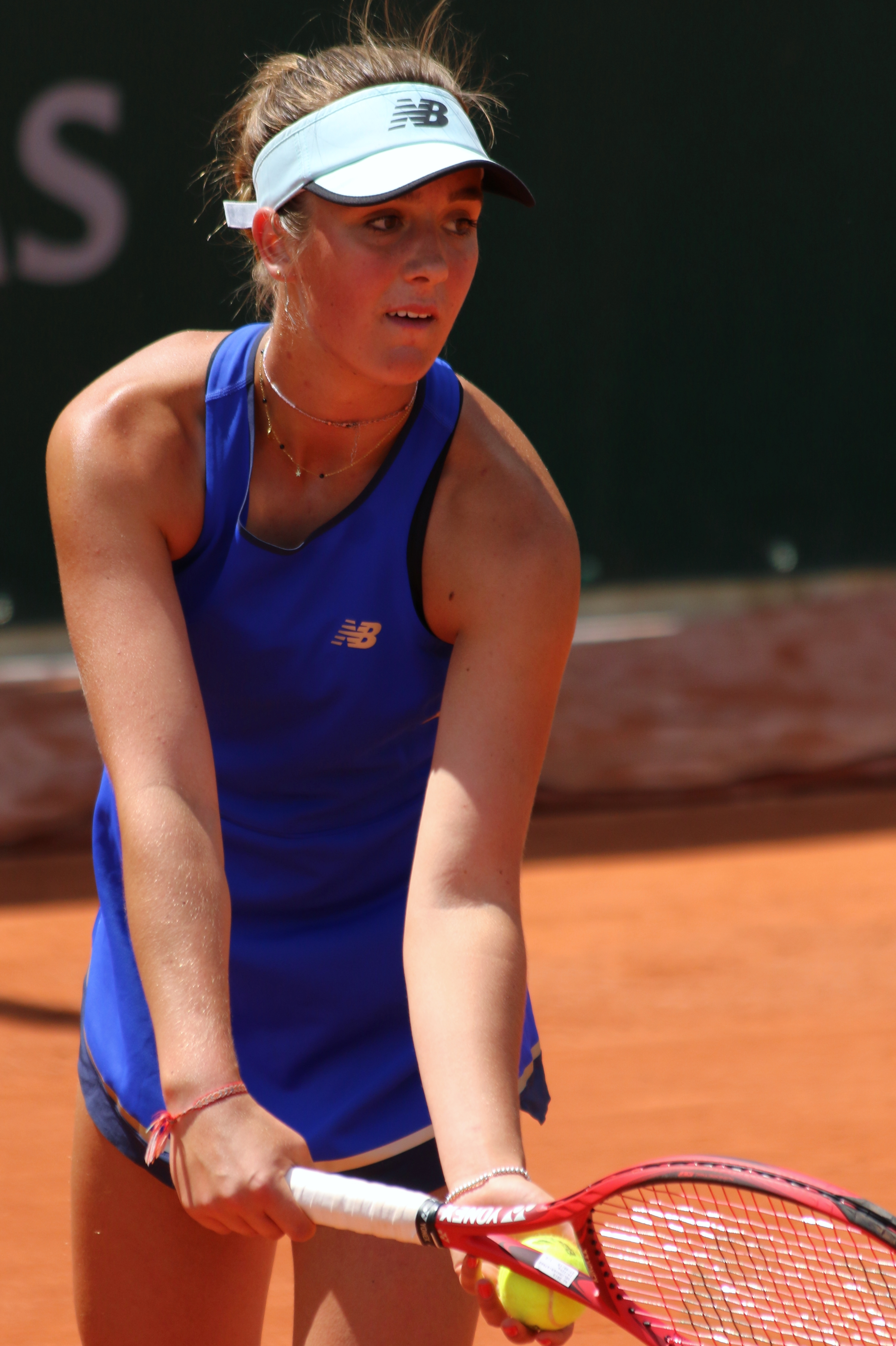 Belgraver RG19 (11)